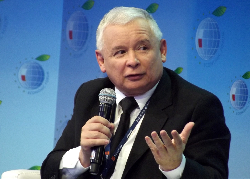 Zdjęcie zrobione podczas XXIII Forum Ekonomicznego w Krynicy-Zdroju.